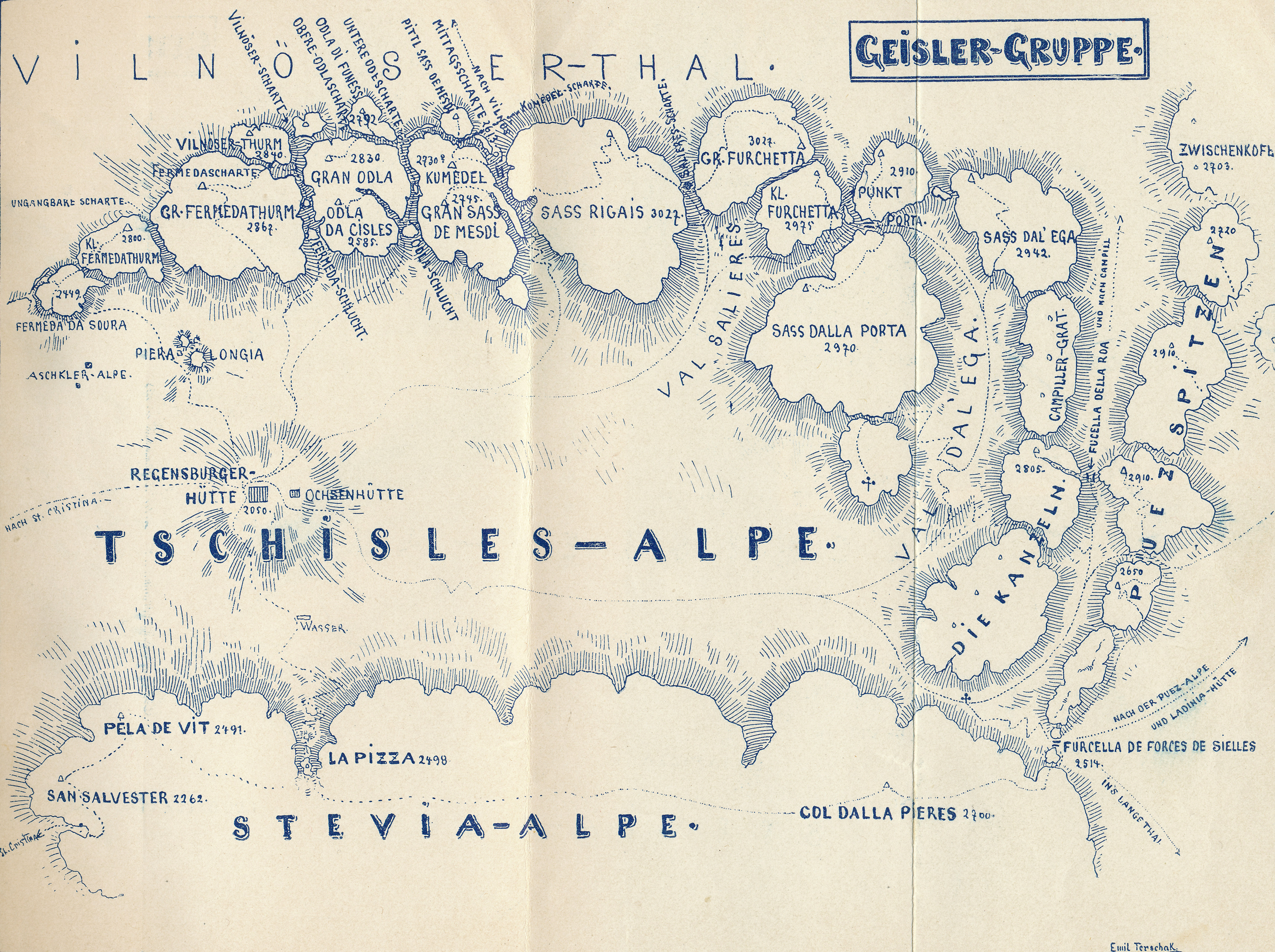 Emil Terschak: Illustrierter Führer durch die Grödener Dolomiten. Fischer & Bröckelmann, Berlin 1896. by